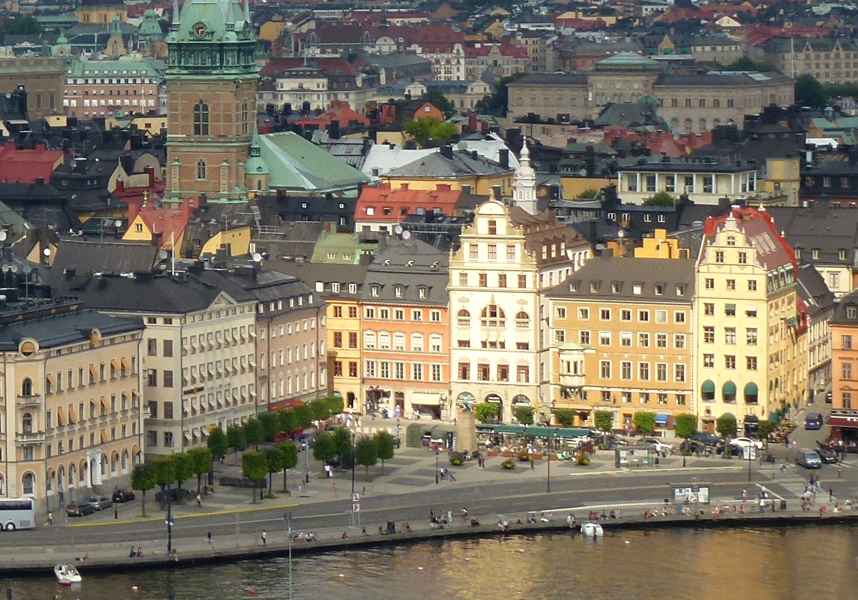 Kornhamnstorg från Mariakyrkan